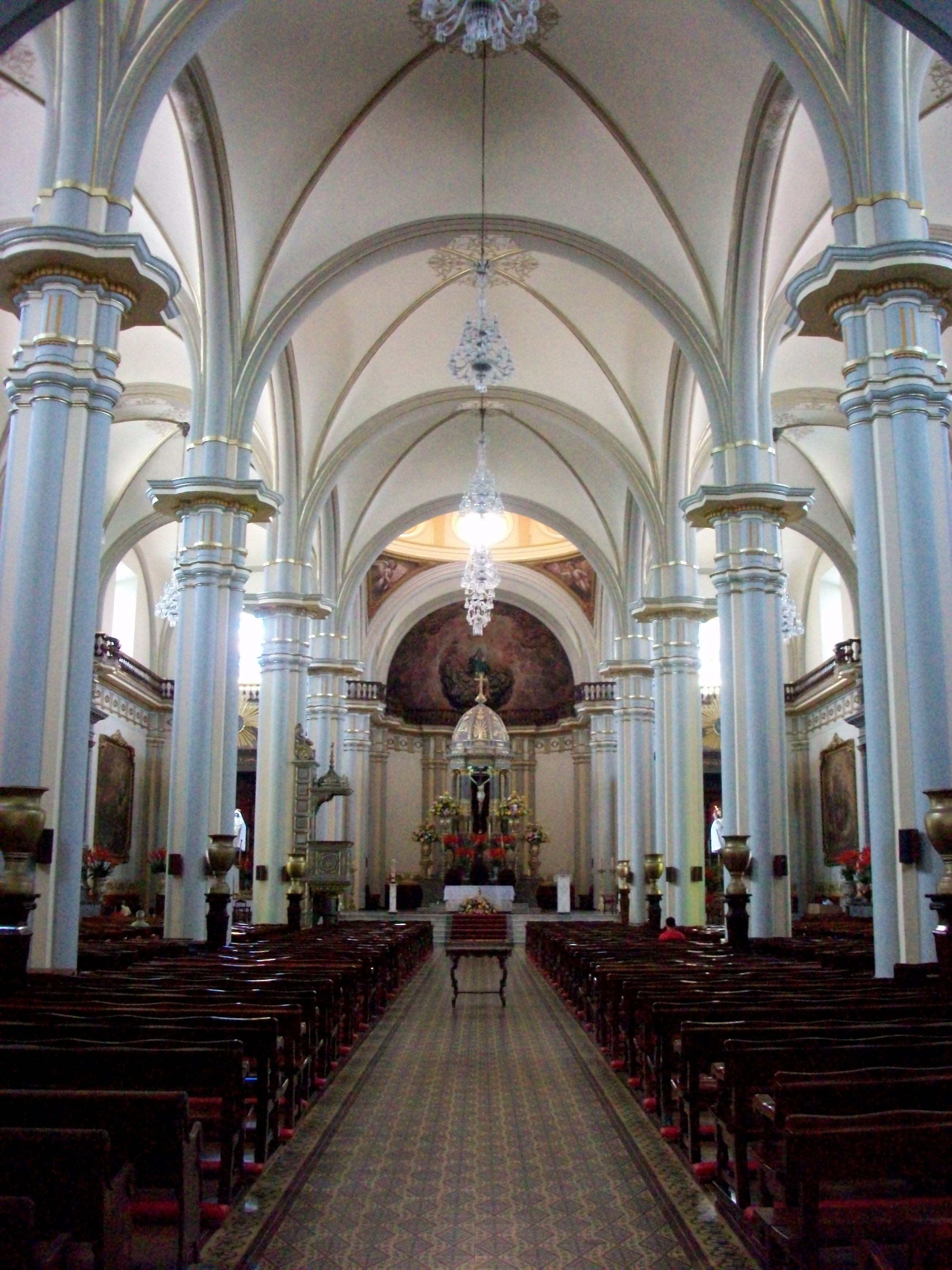 Interior de la Catedral de la Santísima Virgen de la Asunción. Ciudad Guzmán, Zapotlán el Grande, Jalisco.